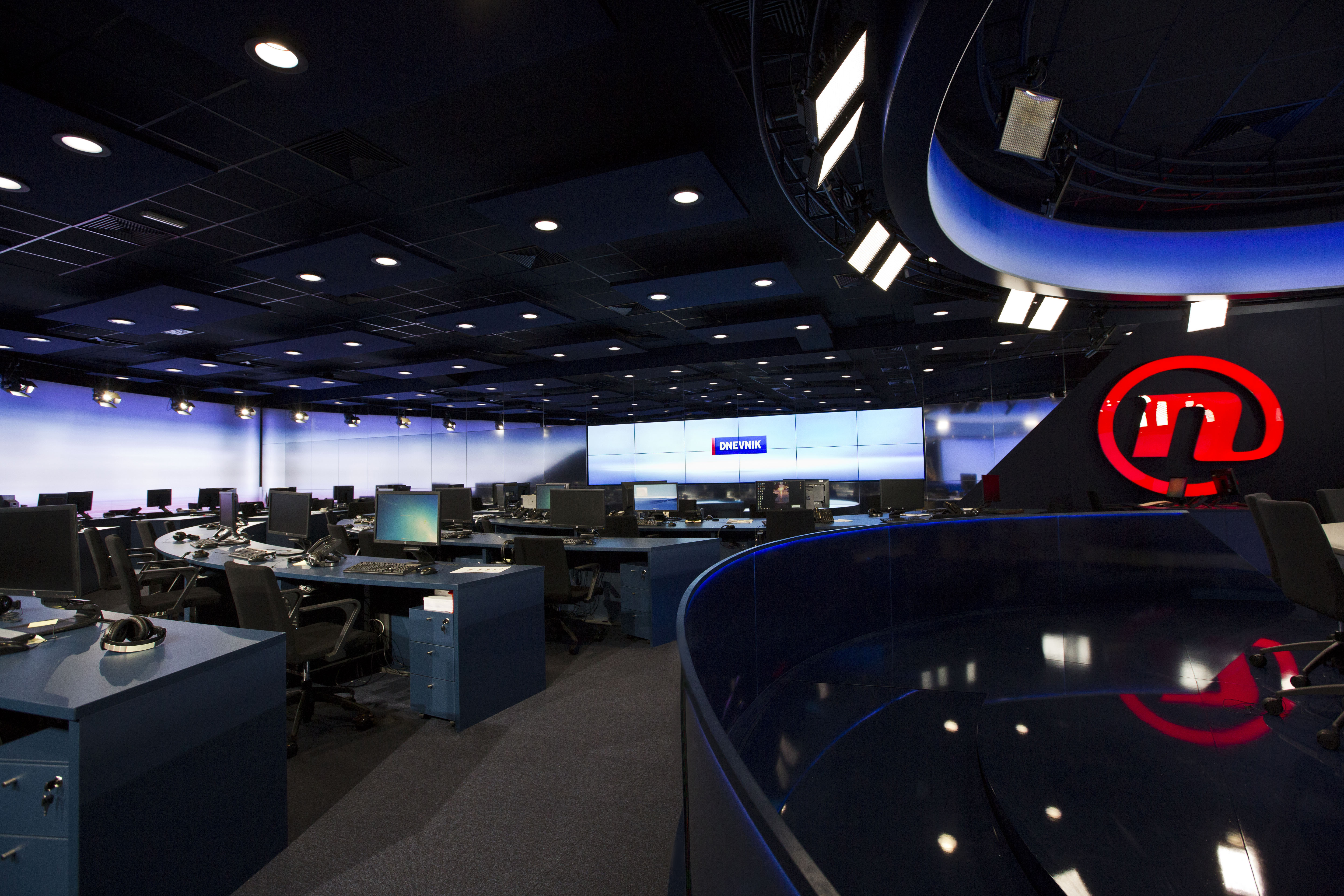 Studio Nove TV